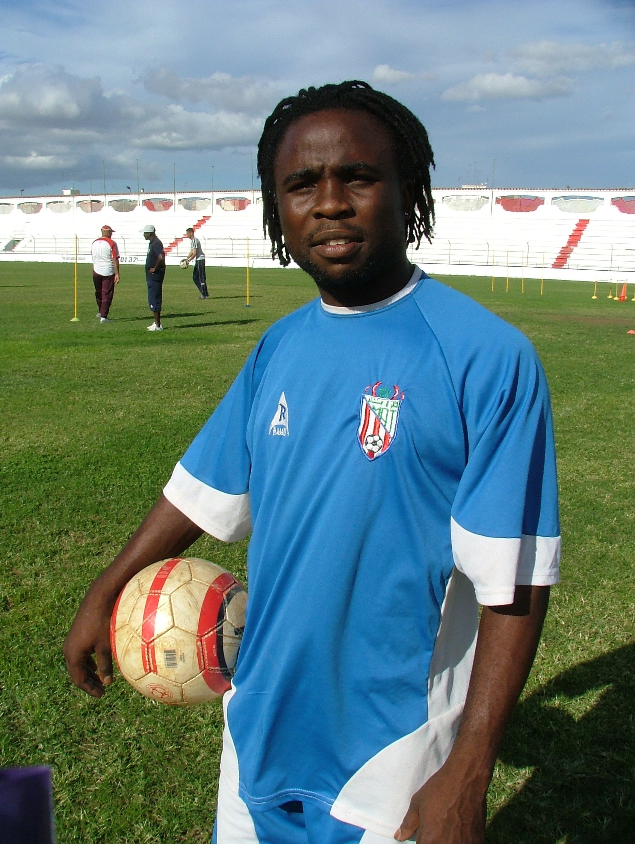 Salam